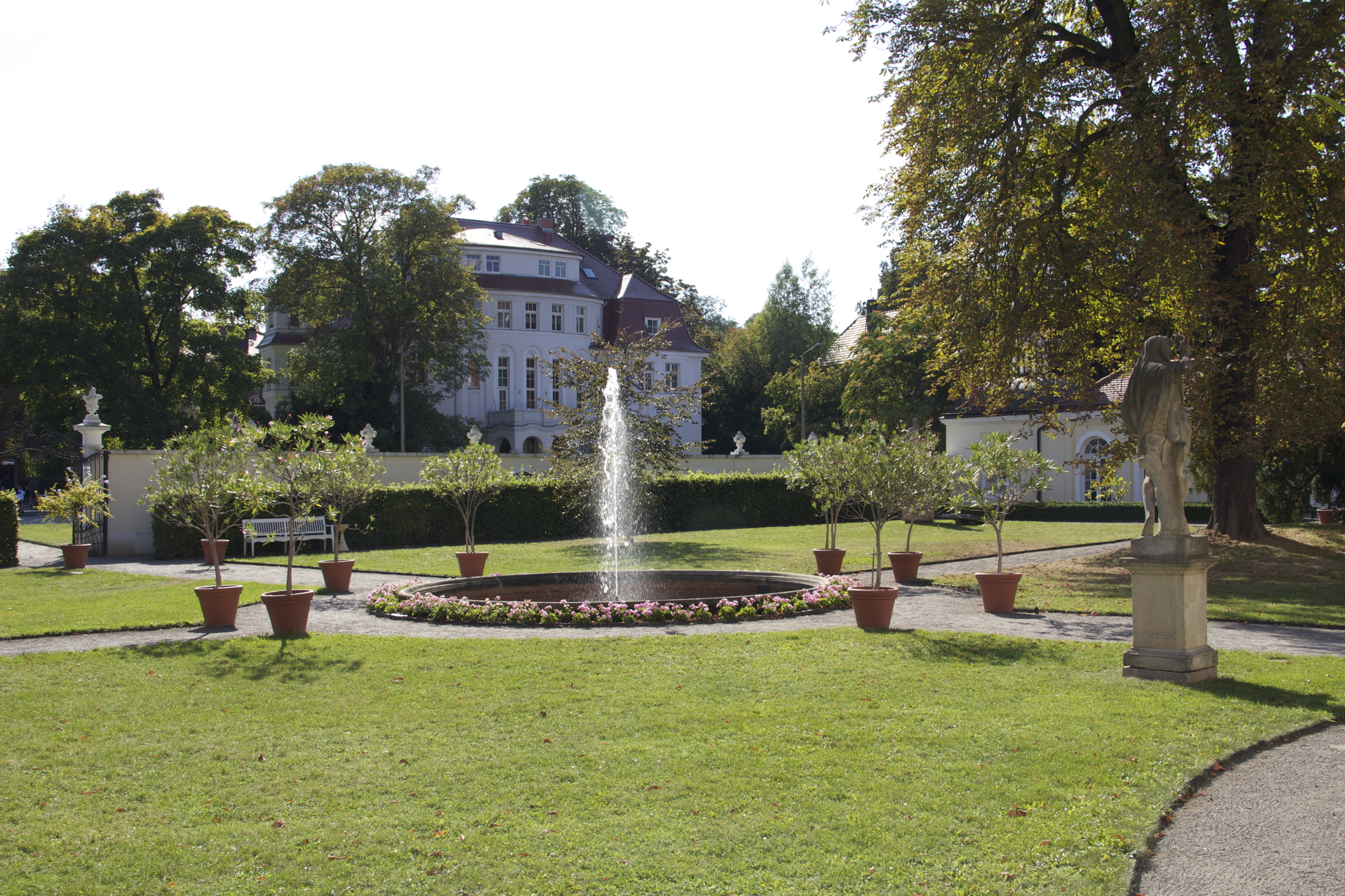 Schlosspark des Gohliser Schlösschens